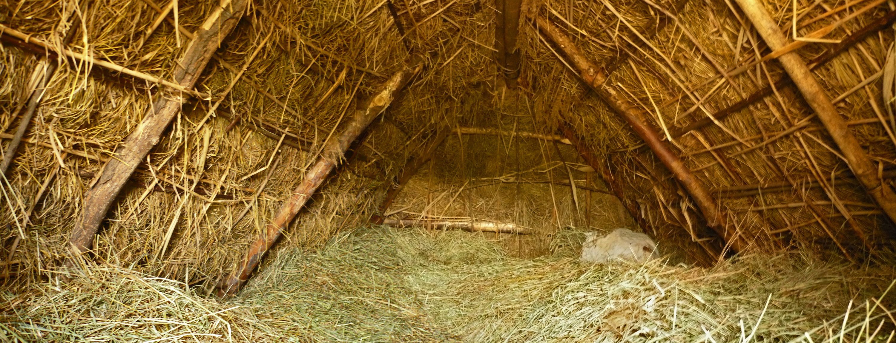 Шалаш, вид изнутри. Село Устинка, Белгородского района. 2009.